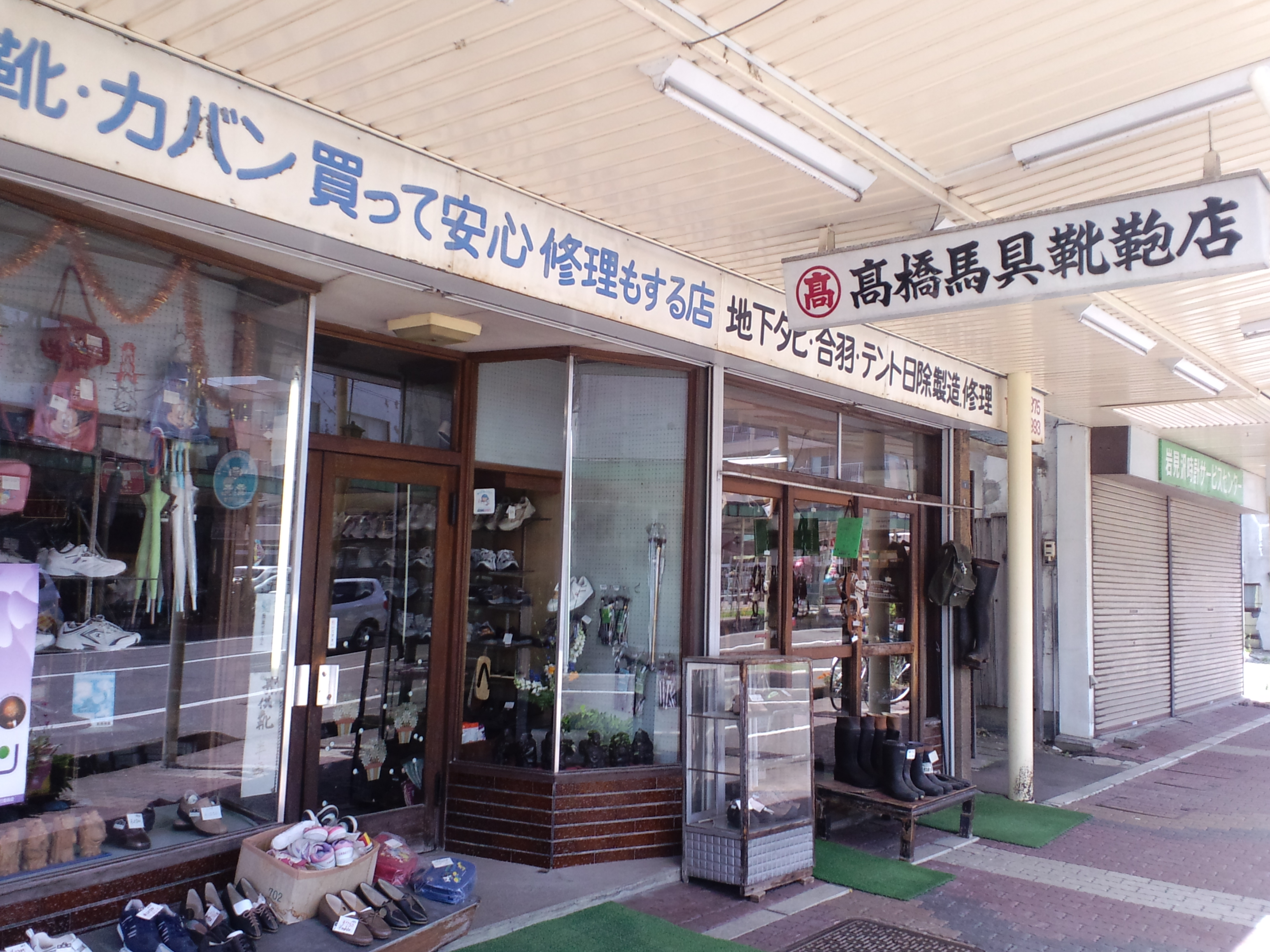 高橋馬具靴鞄店